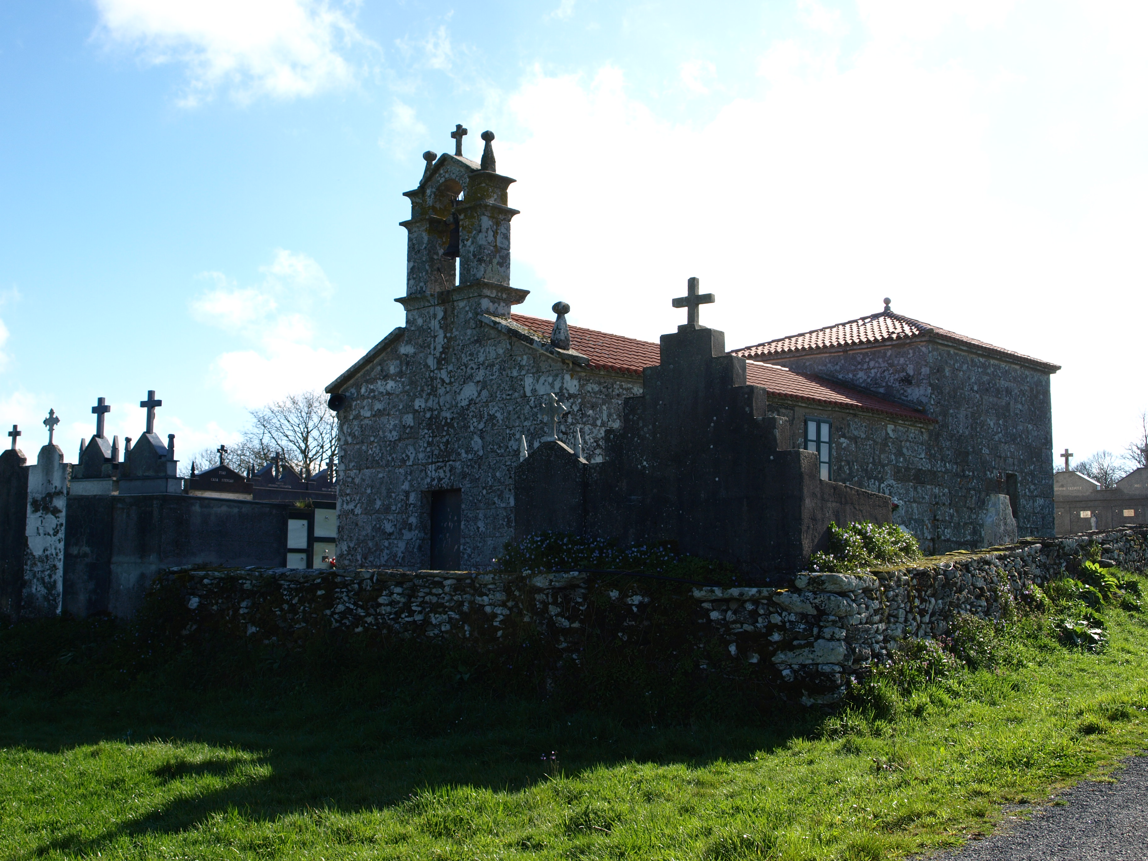 Igrexa parroquial de Barreiro (Antas de Ulla)